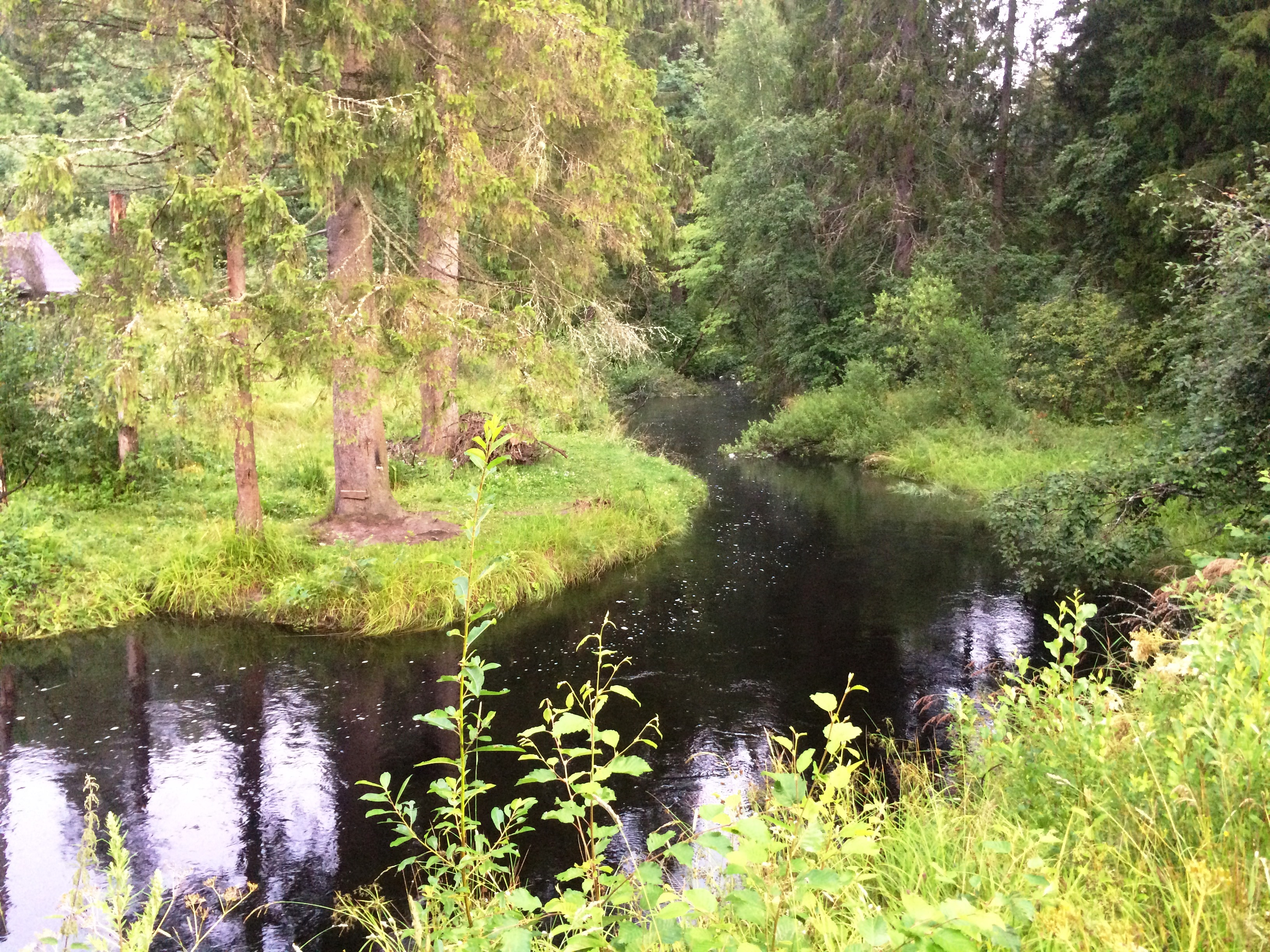 Аурайоки (река, впадает в Ладожское озеро)